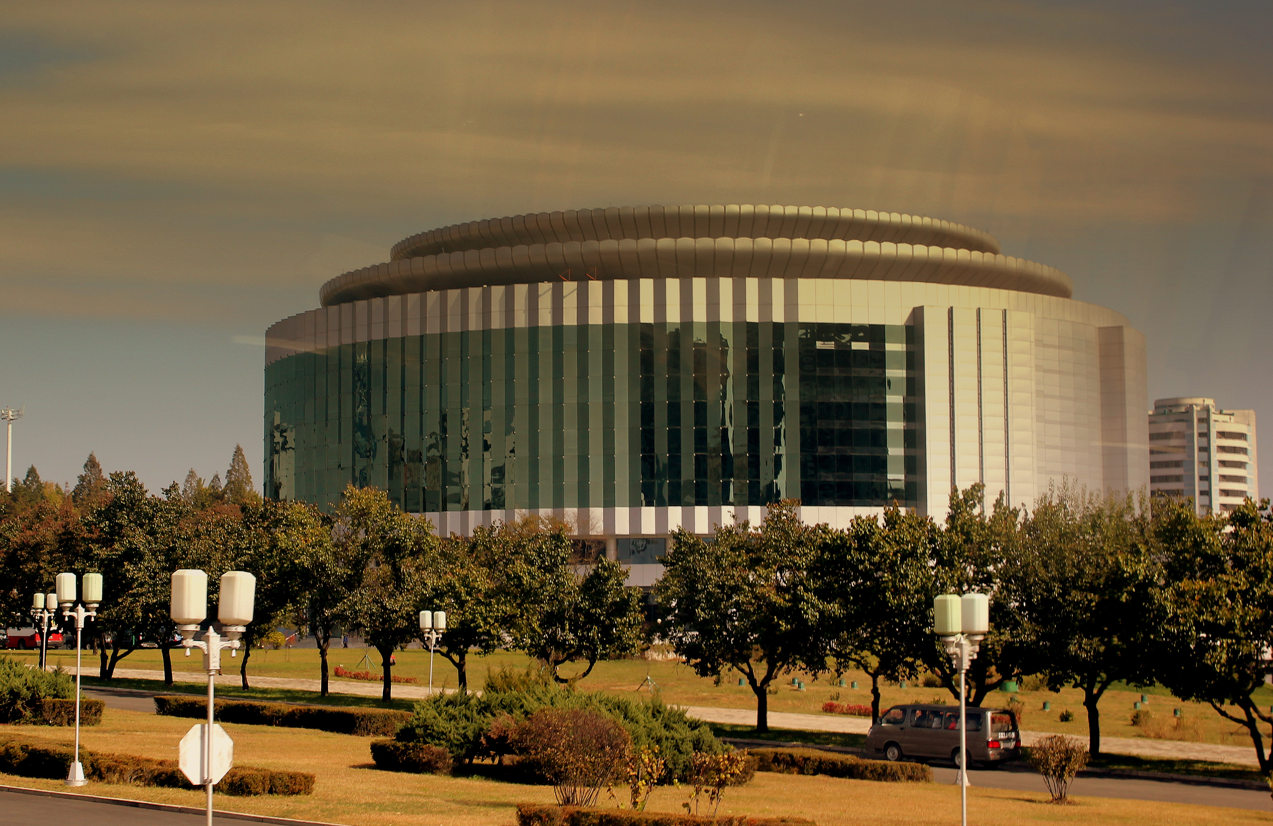 PYONGYANG CITY DPRK NORTH KOREA OCT 2012